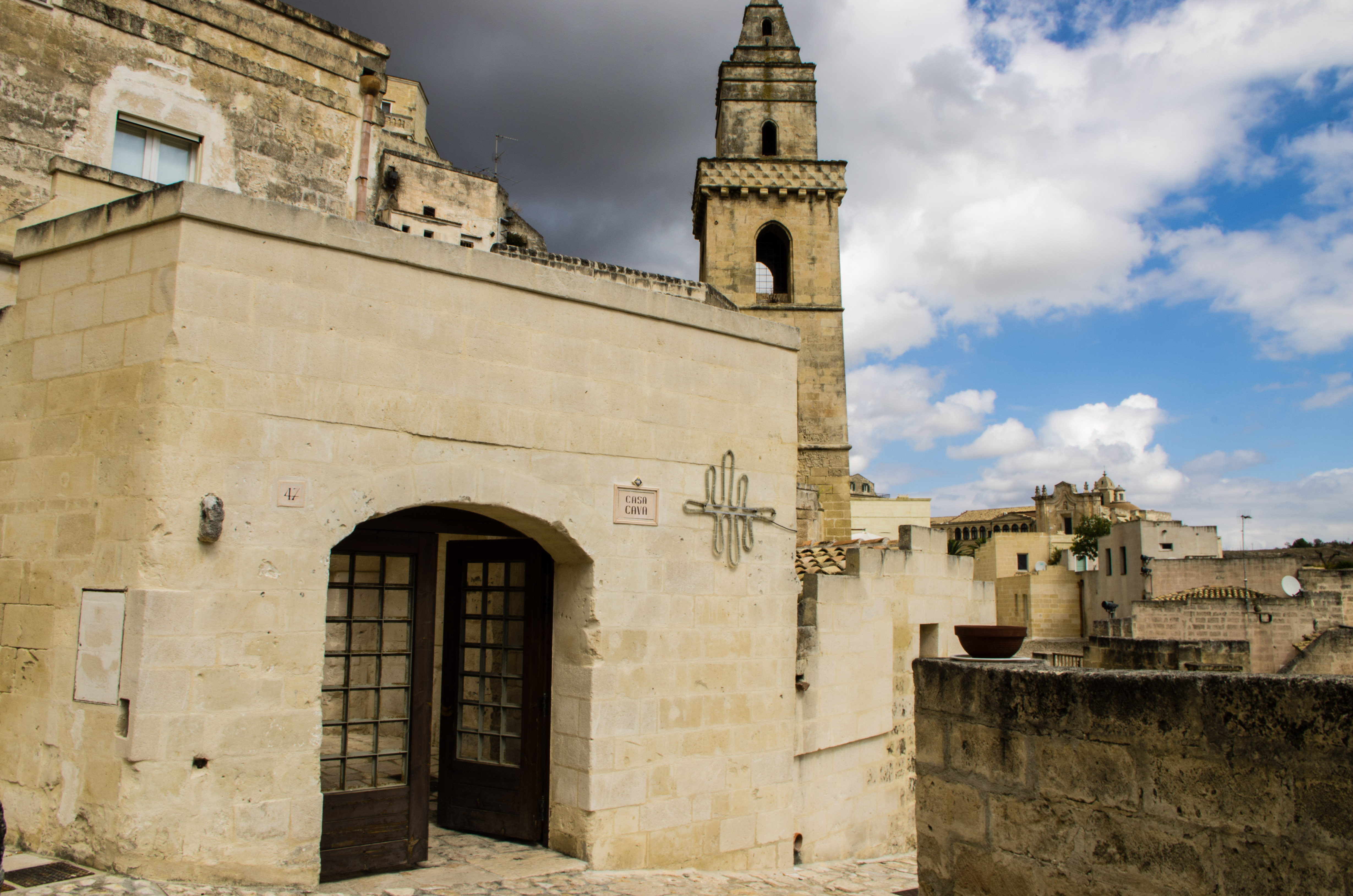 Casa Cava This is a photo of a monument which is part of cultural heritage of Italy.